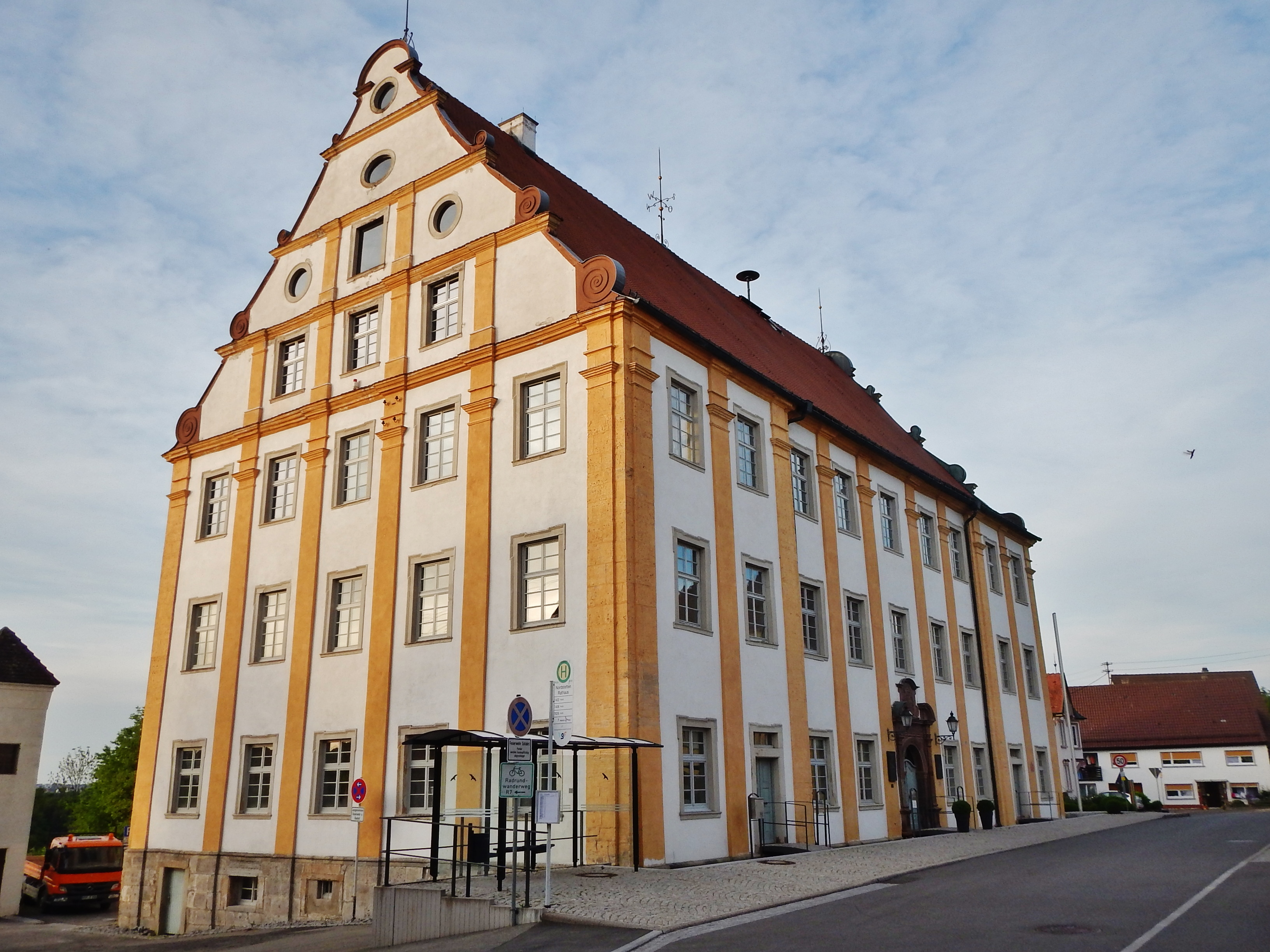 Rathaus in Nordstetten, ehemaliges Schloss